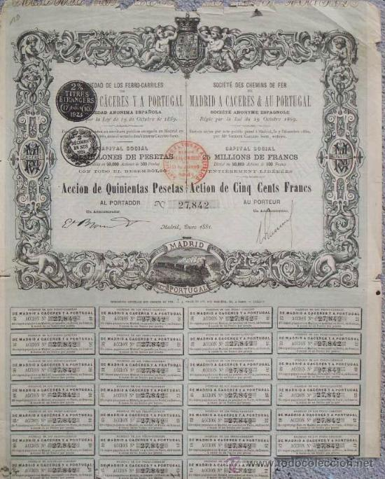 Acción de 500 pesetas emitida por la Compañía de los Ferrocarriles de Madrid a Cáceres y Portugal, en 1881.